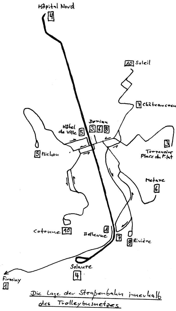 Description: Straßenbahn-Gleisplan und O-Bus-Netzplan St. Étienne 1995 *Source: Maximilian Dörrbecker